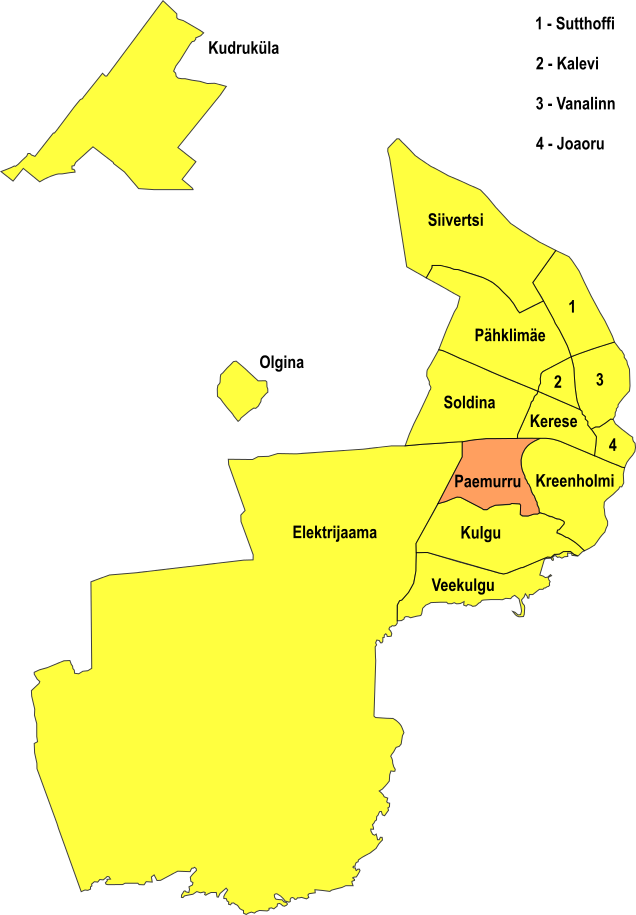 Narva linnaosa Paemurru